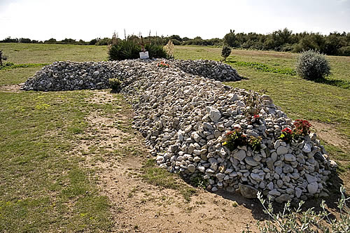 Croix de galets - Île Madame - Charente-Maritime Photo issue de ma banque d'images : Pep.per 14 octobre 2006 à 10:43 (CEST)